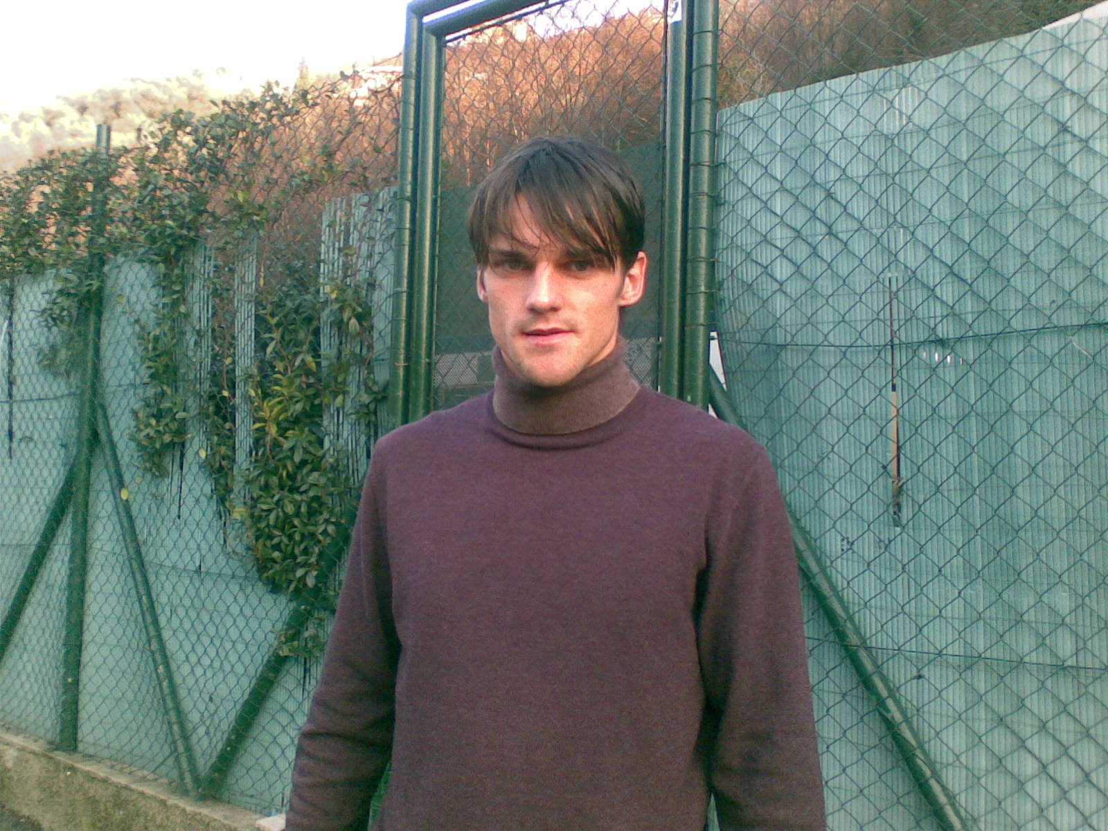 Il calciatore Christian Maggio a Bogliasco (GE)